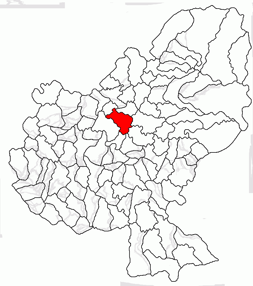 Categorie:Hărţi ale judeţului Mureş